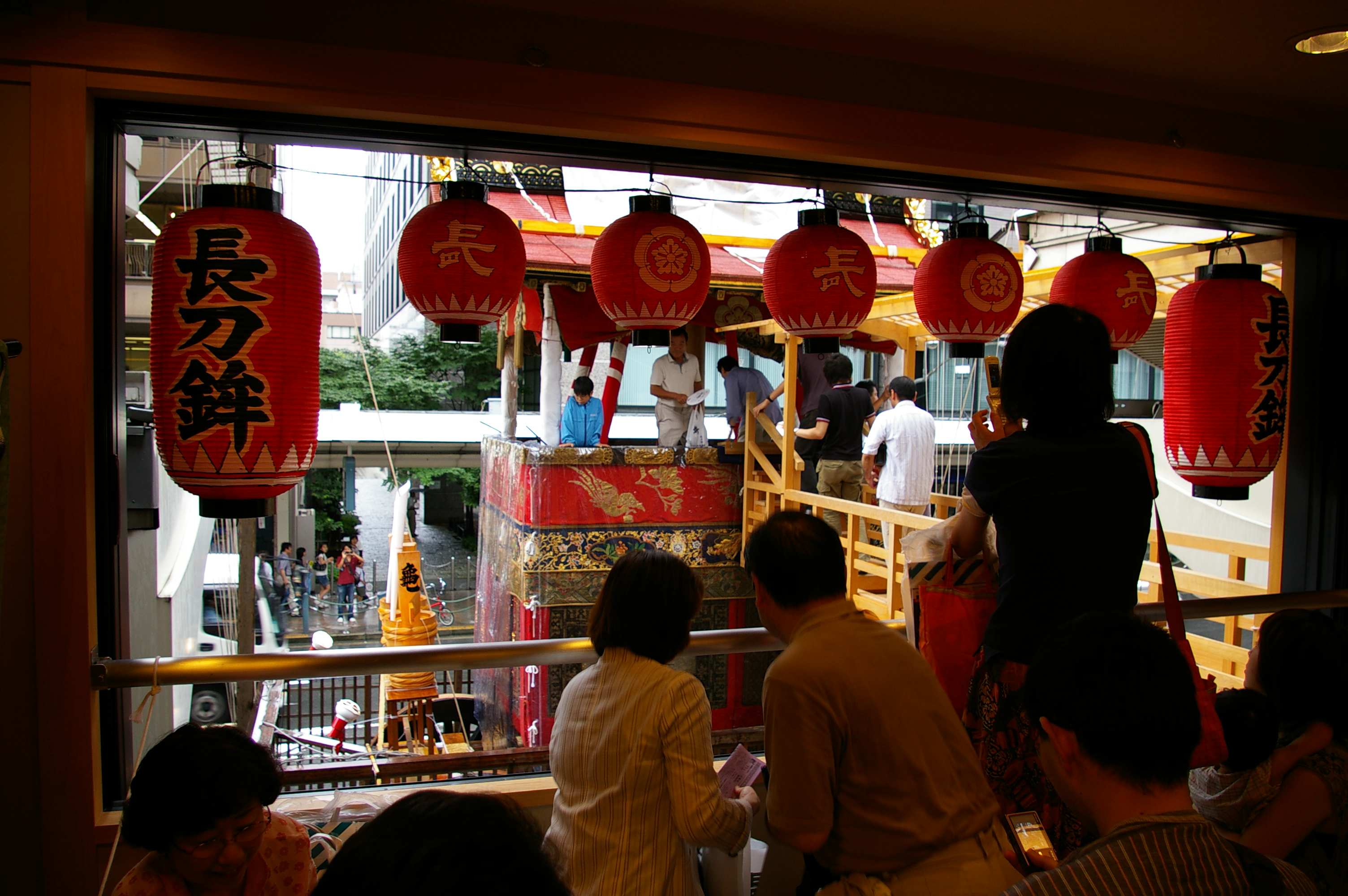 町家より長刀鉾を望む。婦人並びに忌中の者は鉾上には上がれない。.